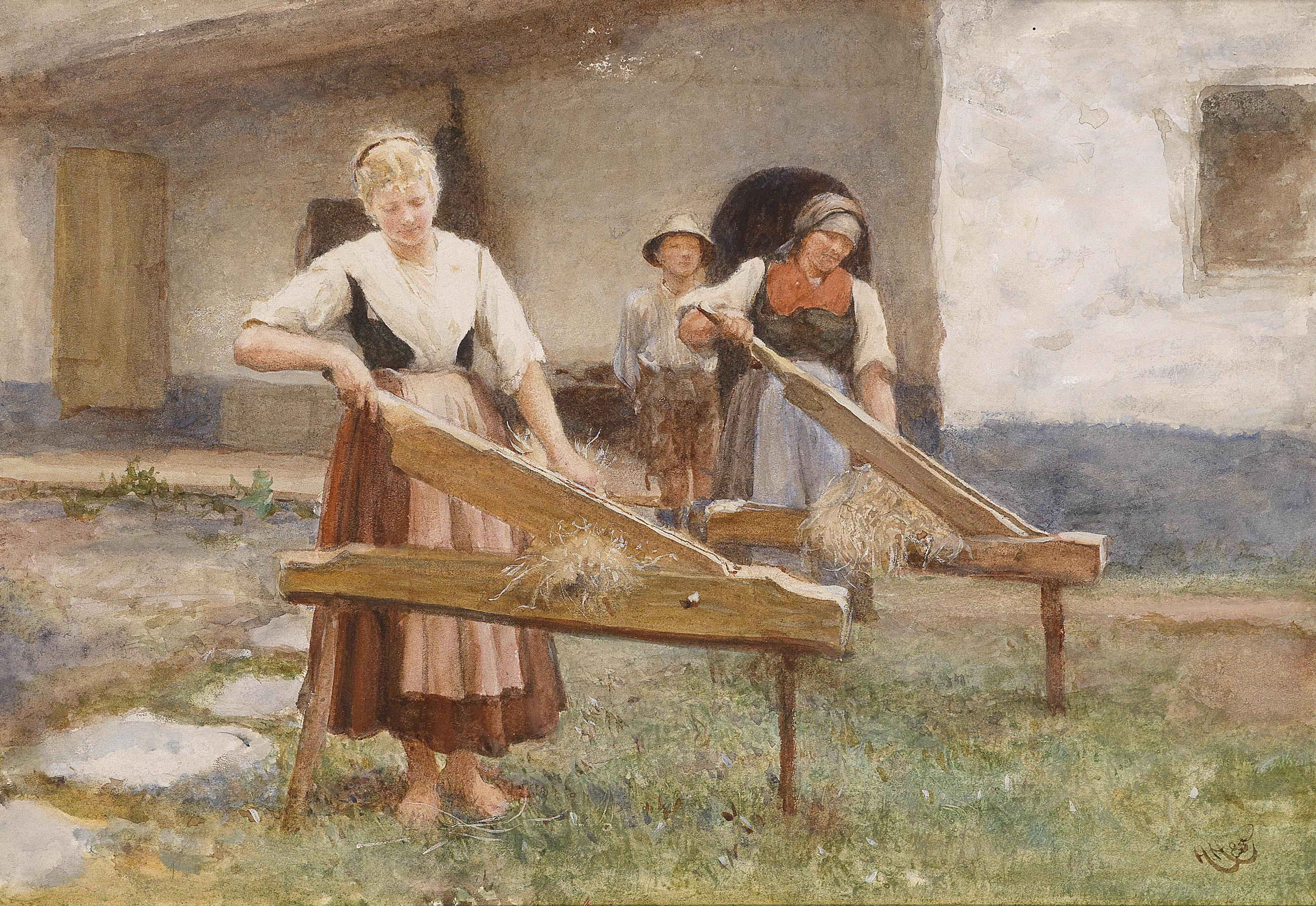 Junge Bäuerinnen beim Flachs brechen